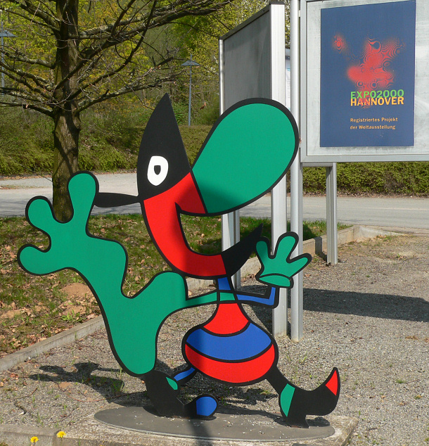 Twipsy in Emmerthal am Institut für Solarenergieforschung